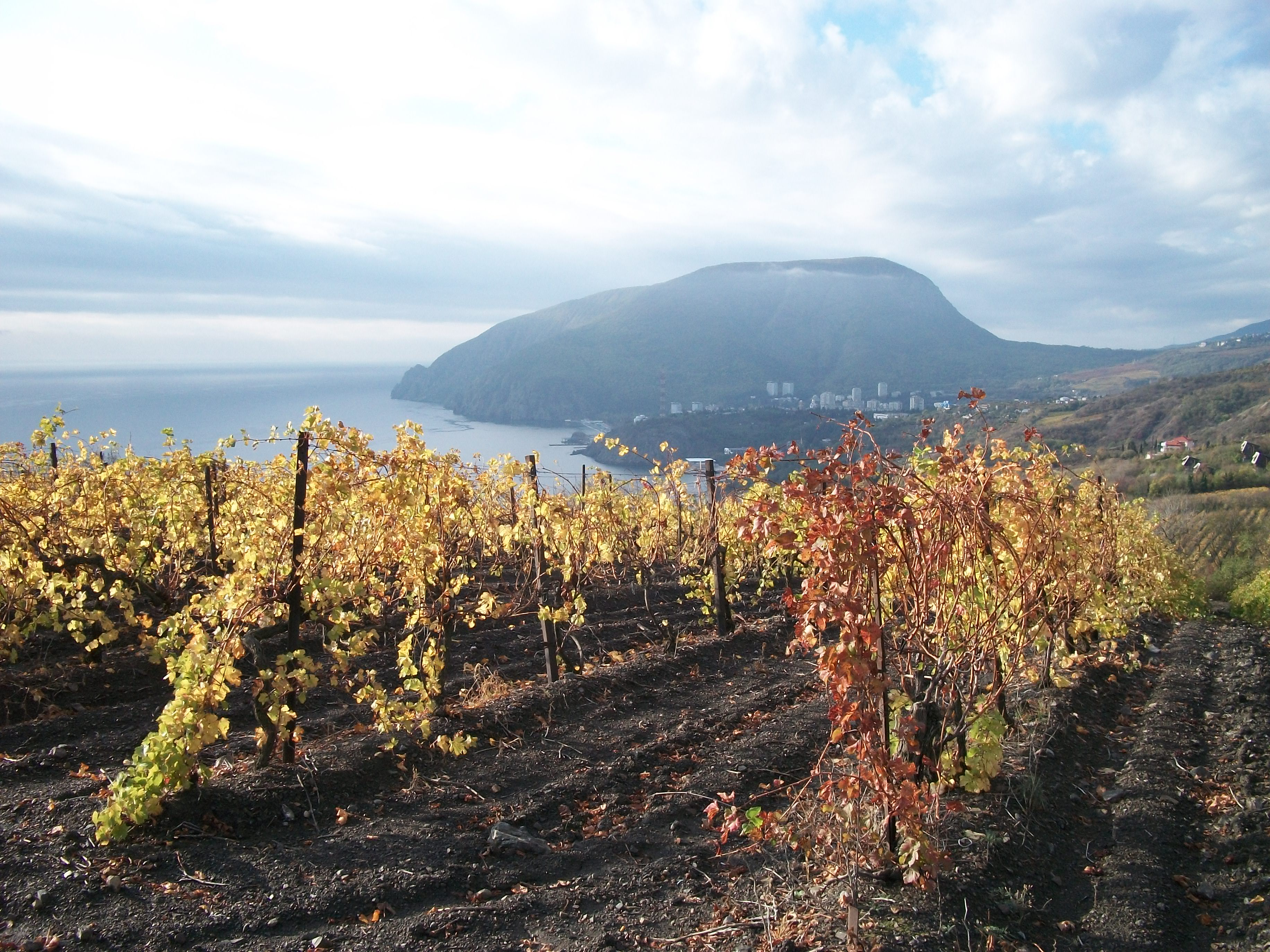 Осенние виноградники на фоне Медведь-горы